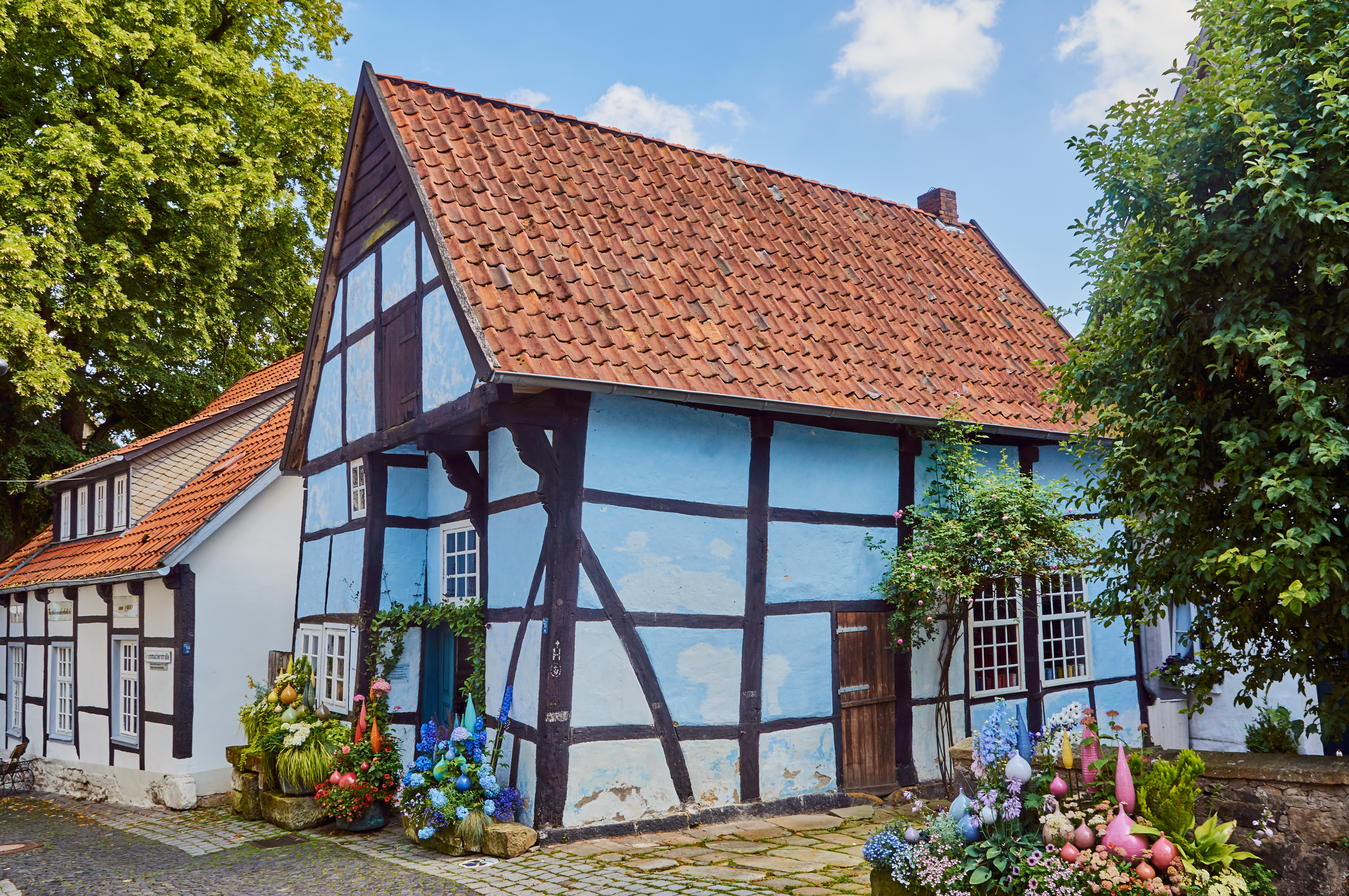 Leinenweberhaus von 1693, Tecklenburg. Das sog. "Schiefe Haus" steht als Fachwerkanbau des Dreiständer-Giebelhauses in der Krummacherstr. 3 unter Denkmalschutz (Kurzbeschreibung aus der Denkmal-Datenbank des Kreises Steinfurt). Es erhielt den 1. Preis in der Kategorie "Kulturelles Erbe" bei den European Conservation Awards 1989. This is a photograph of an architectural monument.